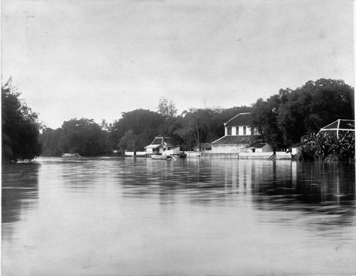 Foto. De achterzijde van het residentiehuis langs de Kali Ketabang, Soerabaja